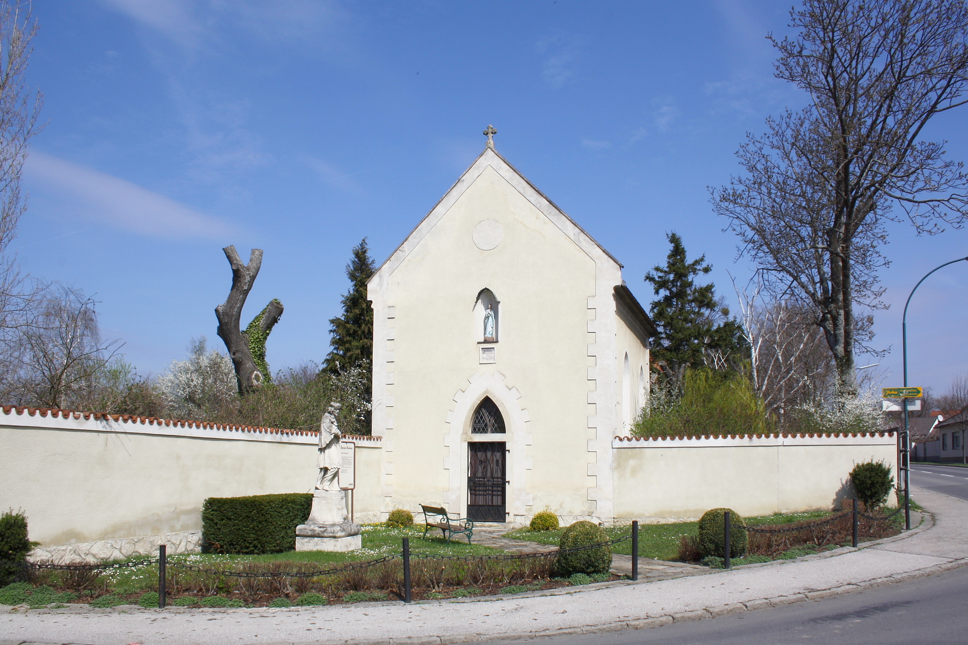 Die Theresienkapelle in der burgenländischen Marktgemeinde Hornstein und davor die denkmalgeschützte Nepomuk-Statue.